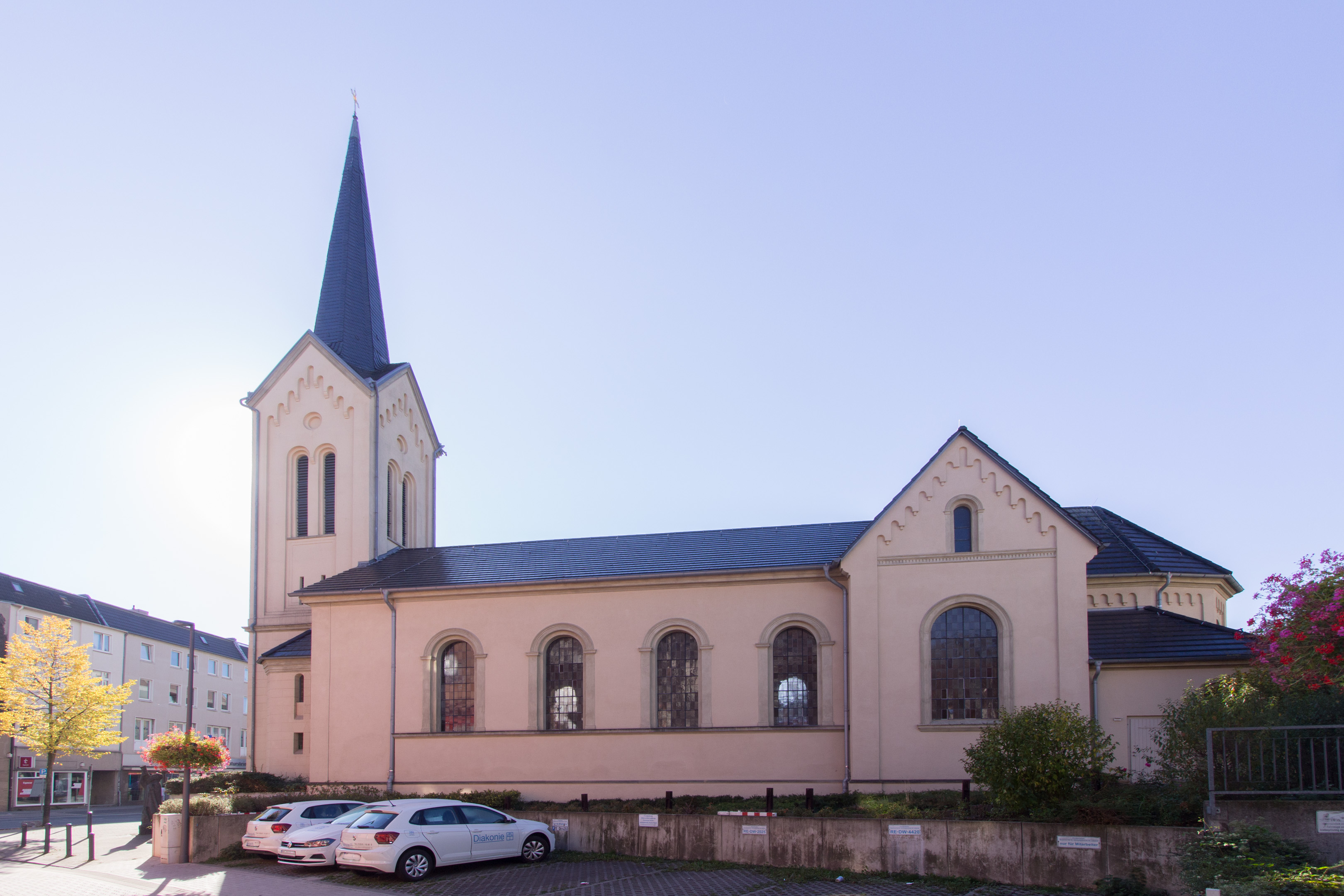 Recklinghausen, Gustav-Adolf-KircheThis is a photograph of an architectural monument., no. 120